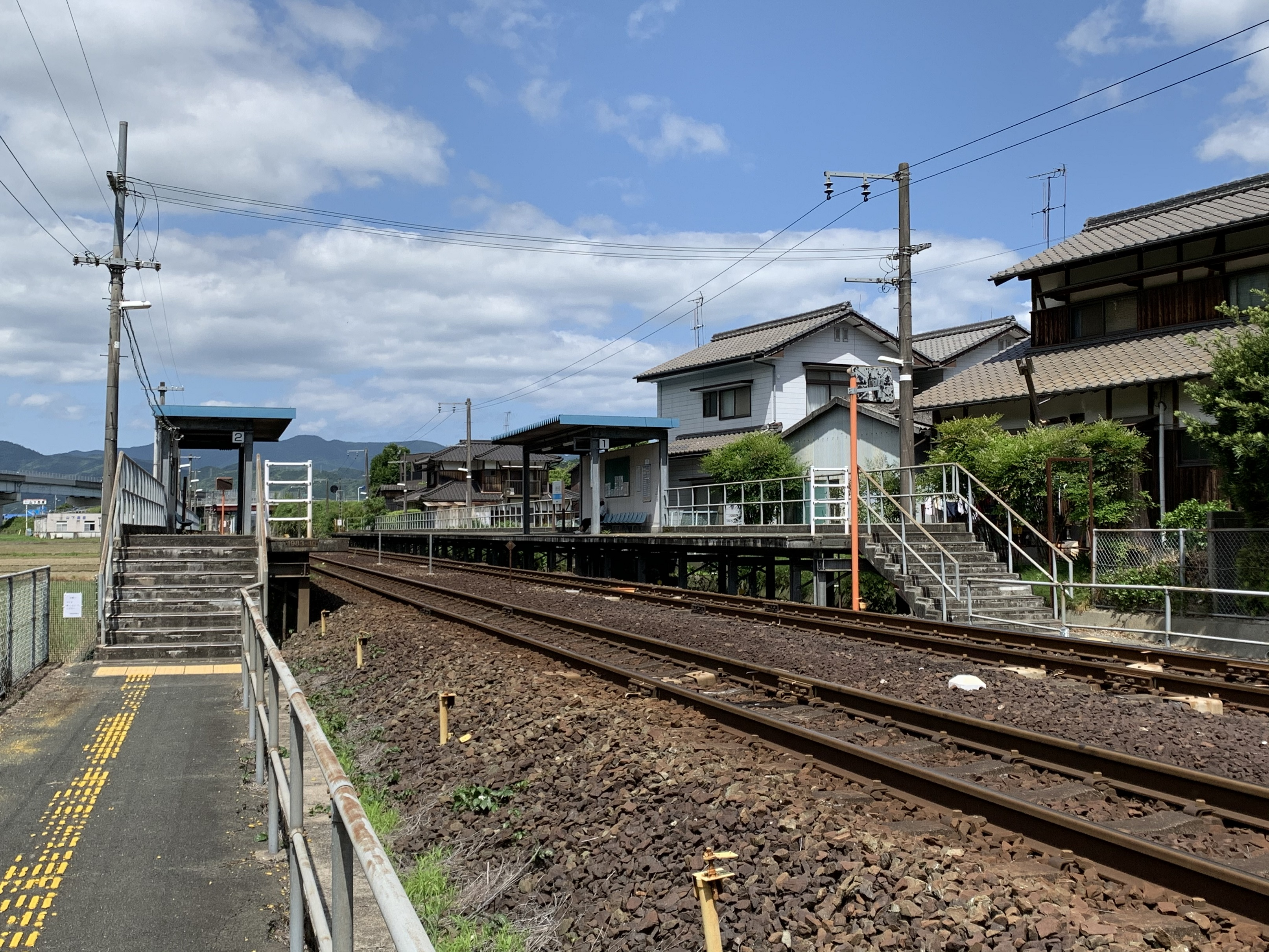 愛媛県大洲市 JR四国 新谷駅